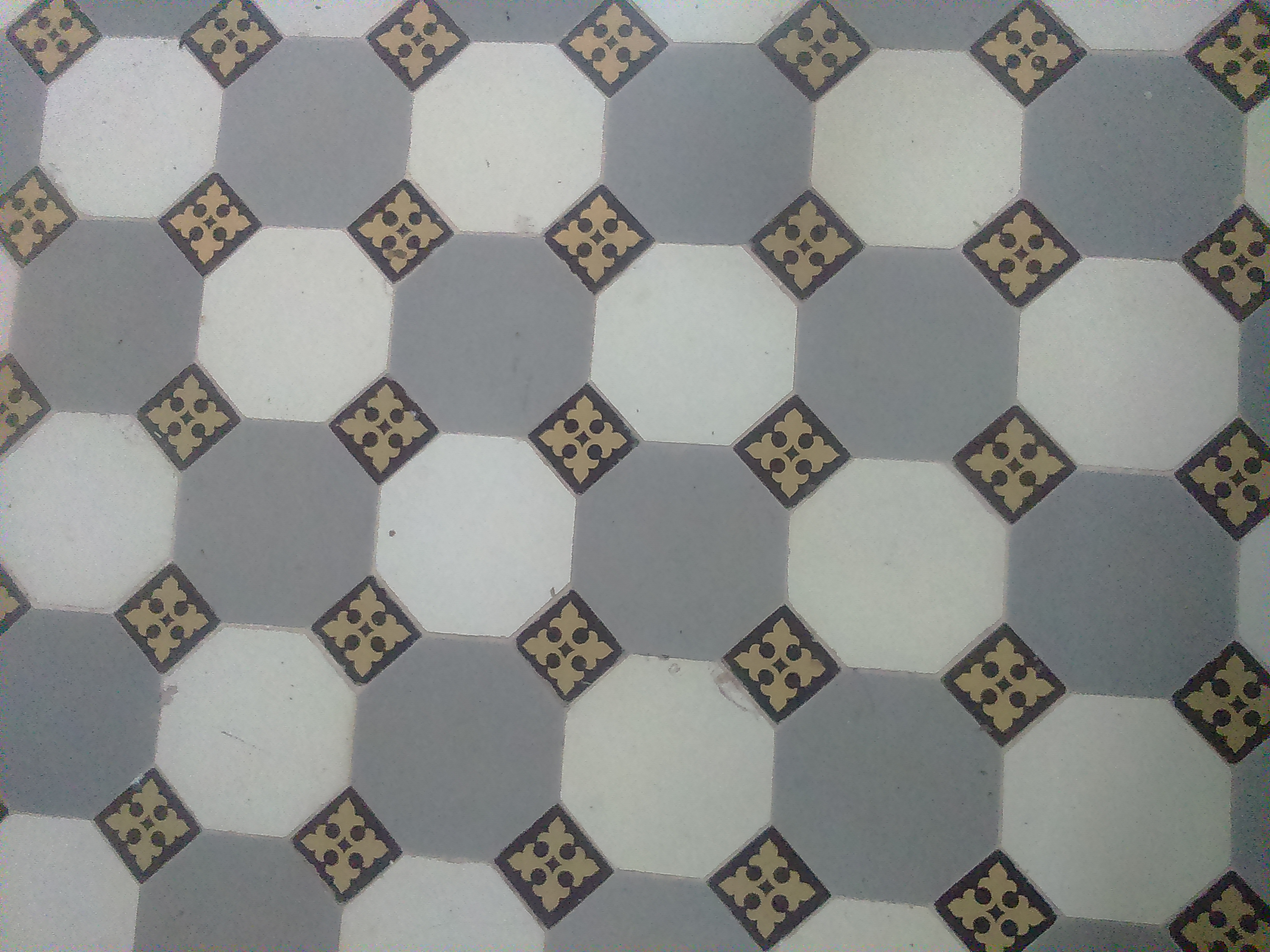 Кафель был специально изготовлен для храма Пророка Илии с селе Ильинское Селивановского района Владимирской области.